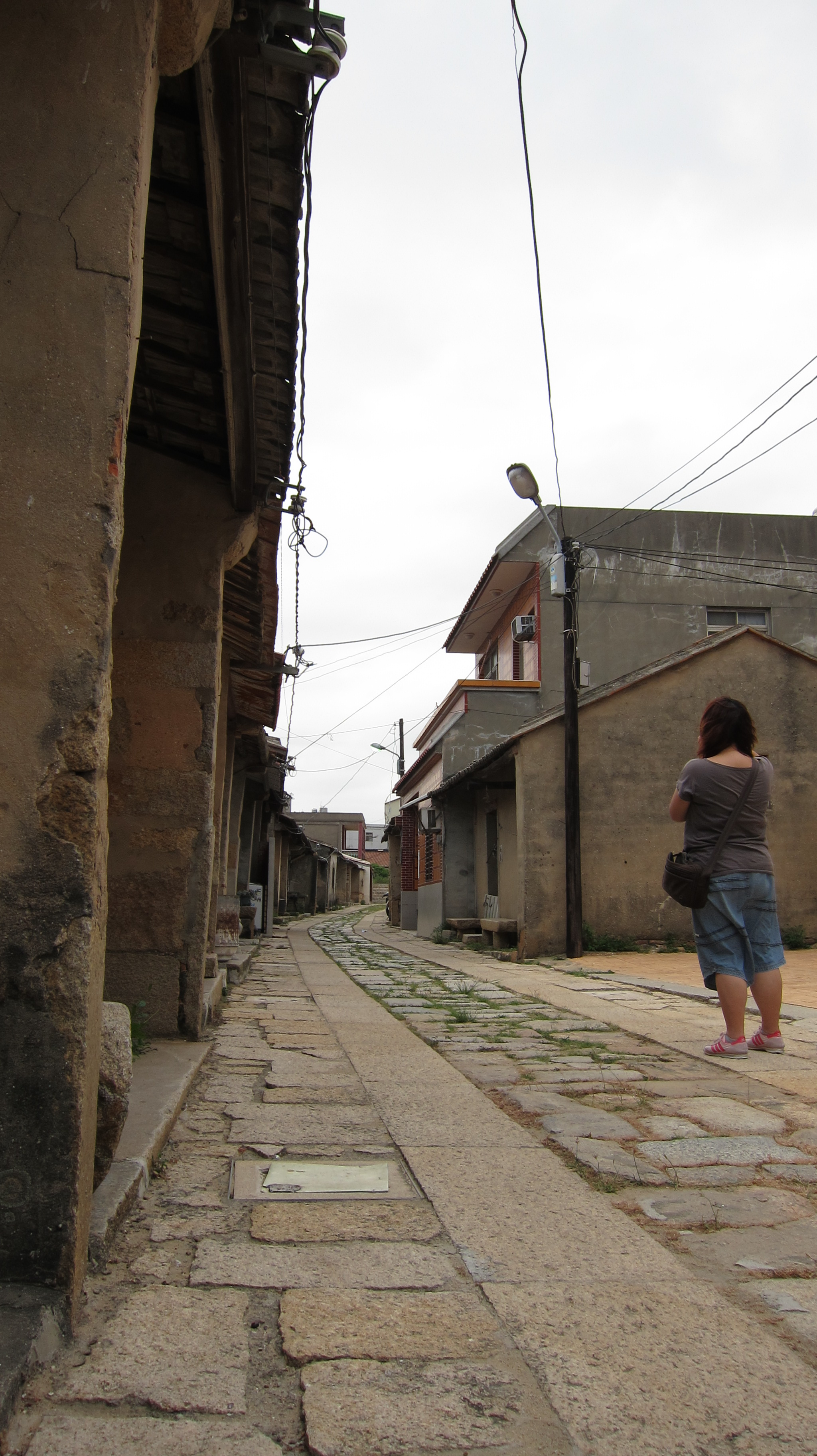 金門明遺古街